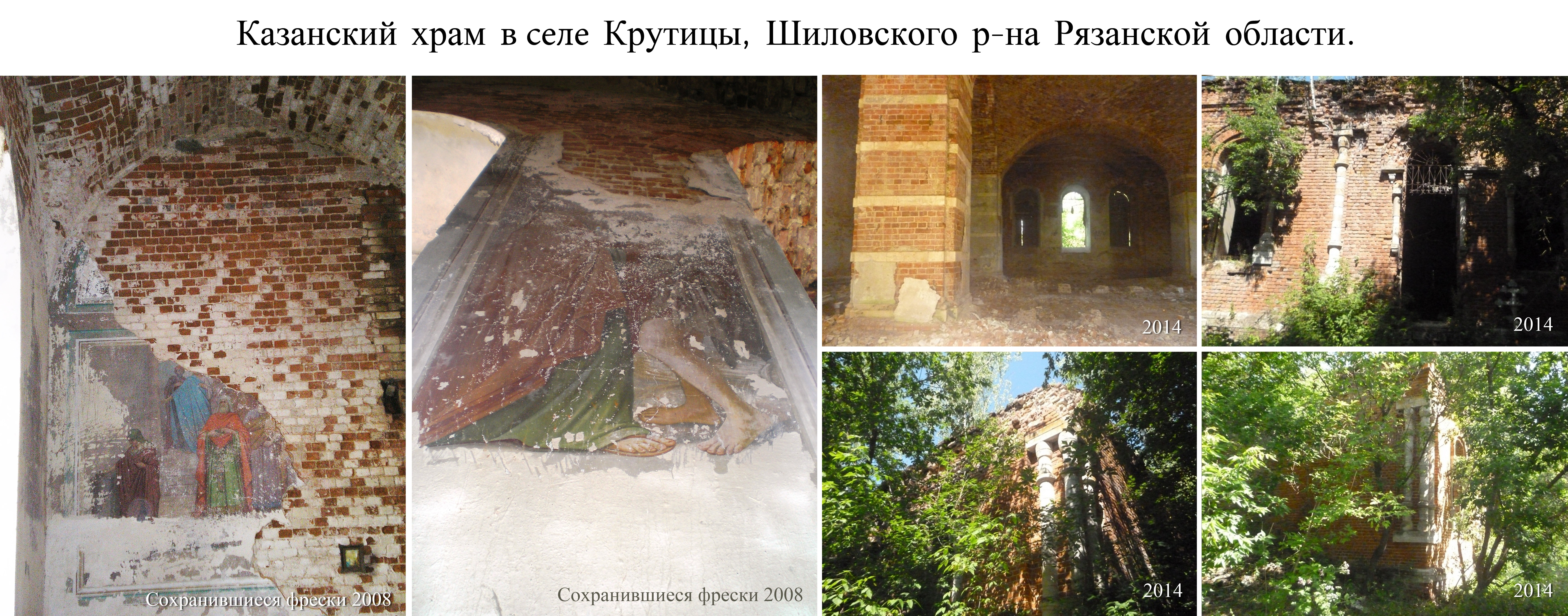 Казанский храм в селе Крутицы, Шиловского р-на Рязанской области.